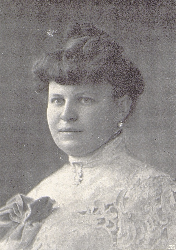 Růžena Maturová, operní pěvkyně